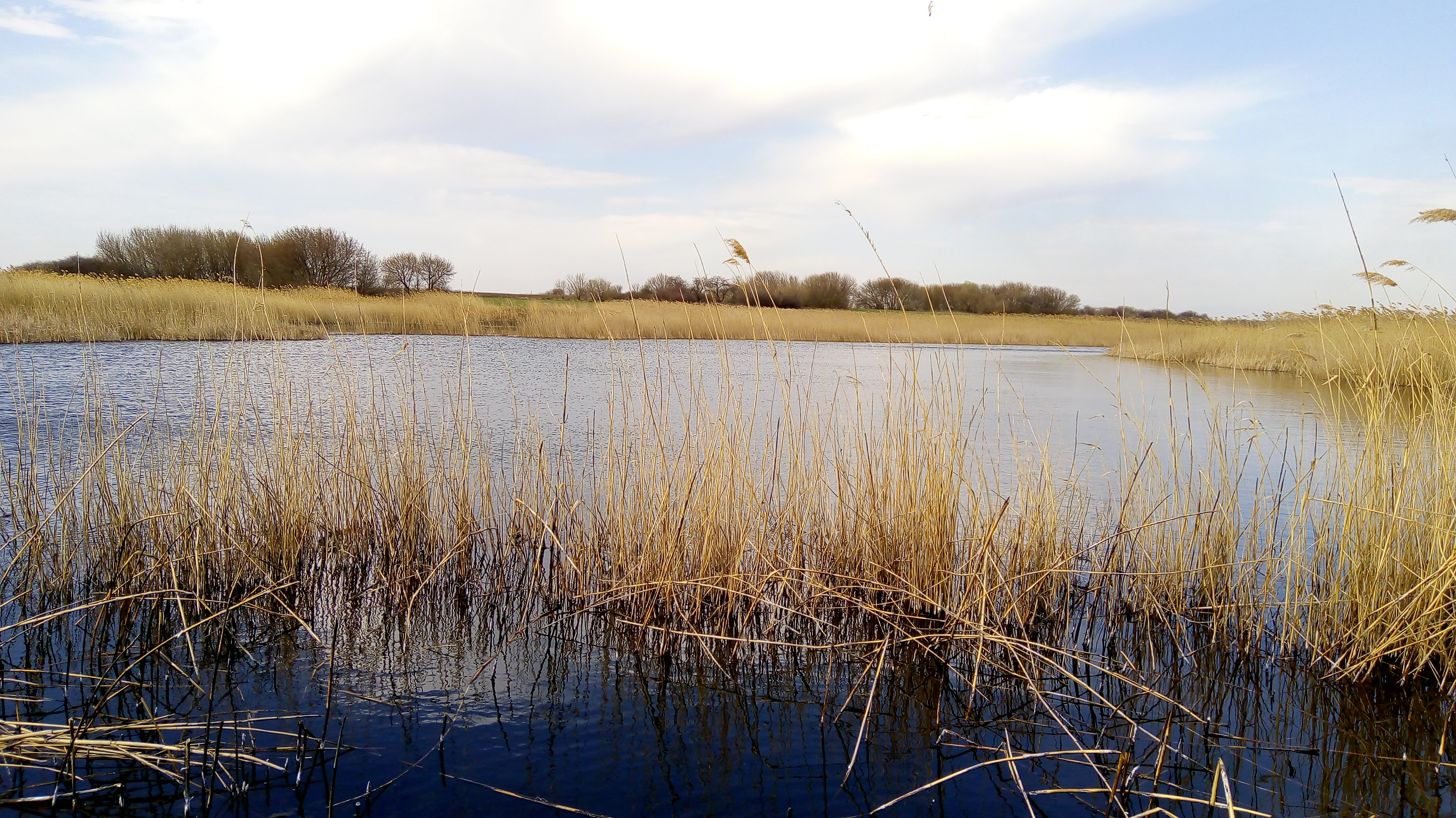 Ставок на річці Плисовій у селі Новоєгорівці (Куберлі); фото - березень 2020 р.